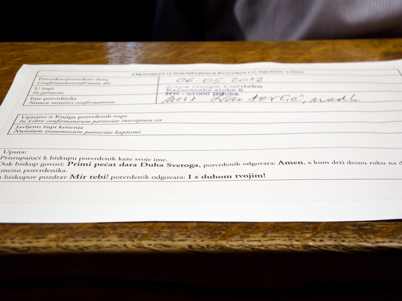 Obred svete potvrde u Kapucinskoj crkvi Gospe Lurdske u Rijeci